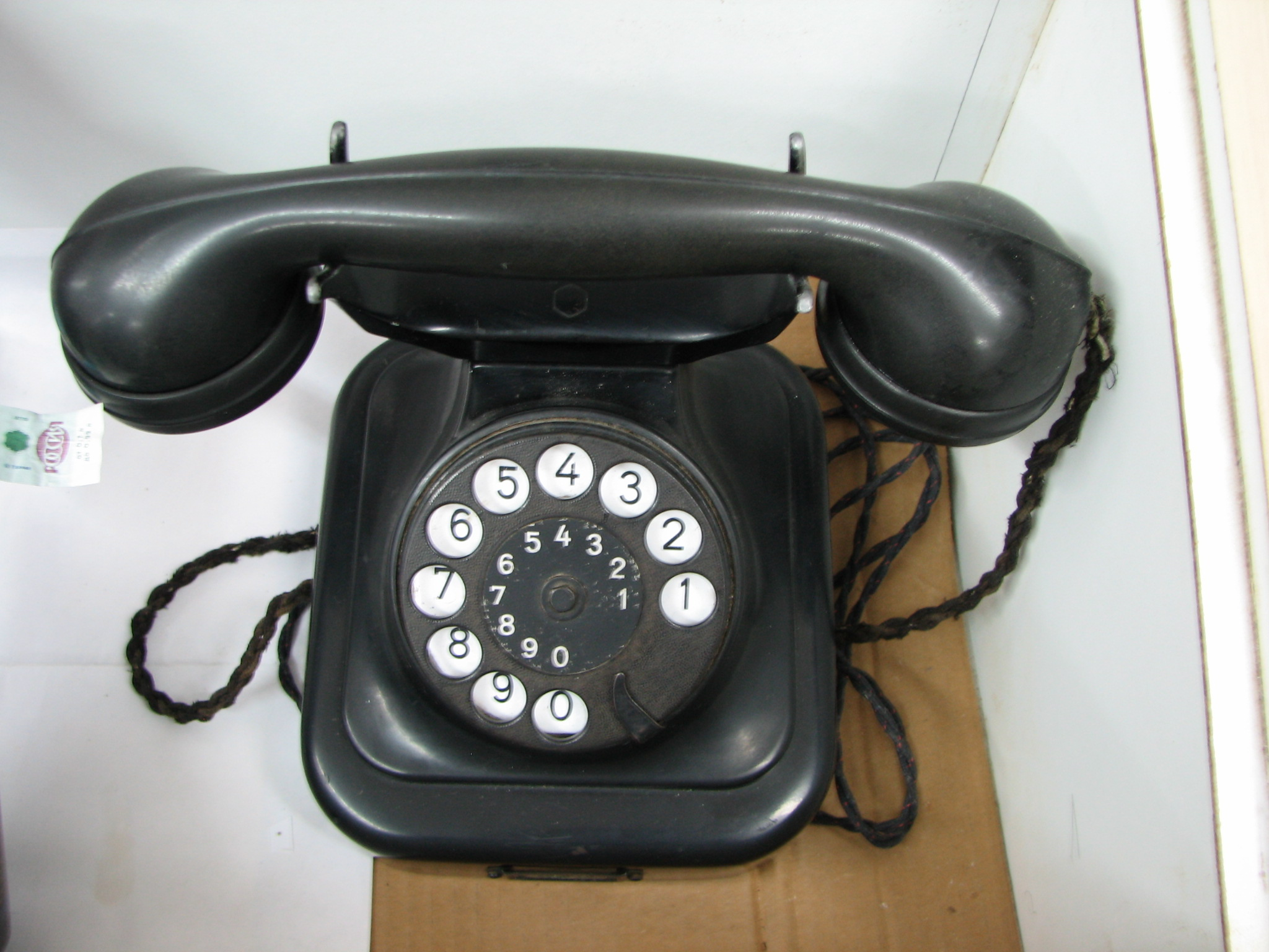 Veteran Museum – Nesher. Israel, The museum is dedicate to Jewish Veterans that fought in The Allies of World War II and made Aliyah to Israel and live (or lived) in the city Nesher in north of Israel. מוזיאון הוטרנים- נשר. הוטרנים הם חיילים יהודים שלחמו לצד בעלות הברית במלחמת העולם השניה. המוזיאון הוקם בשנת 2000 בשכונת בן דור בעיר נשר The Phone was taken from Hitler Bunker – Führerbunker by Gregory Dnayevski on May,3, 1945. Gregory was a political commissar – politruk in the Soviet Army מכשיר הטלפון שבתמונה נלקח על ידי גריגורי דונאייבסקי מהבונקר של היטלר בתאריך 3/5/1945. גרגורי היה פוליטרוק בצבא הסובייטי